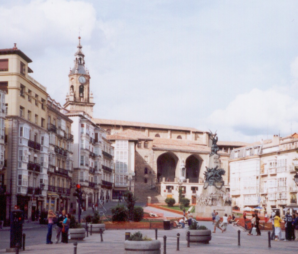 Vitoria, Spain, Plaza de la Virgen Blanca Taken by myself, Benutzer:Ardo Beltz, 1999. --Ardo Beltz 19:57, 14 Feb 2005 (UTC)